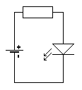 Jednoduchý obvod svítící diody (LED) se zdrojem a předřadným rezistorem.